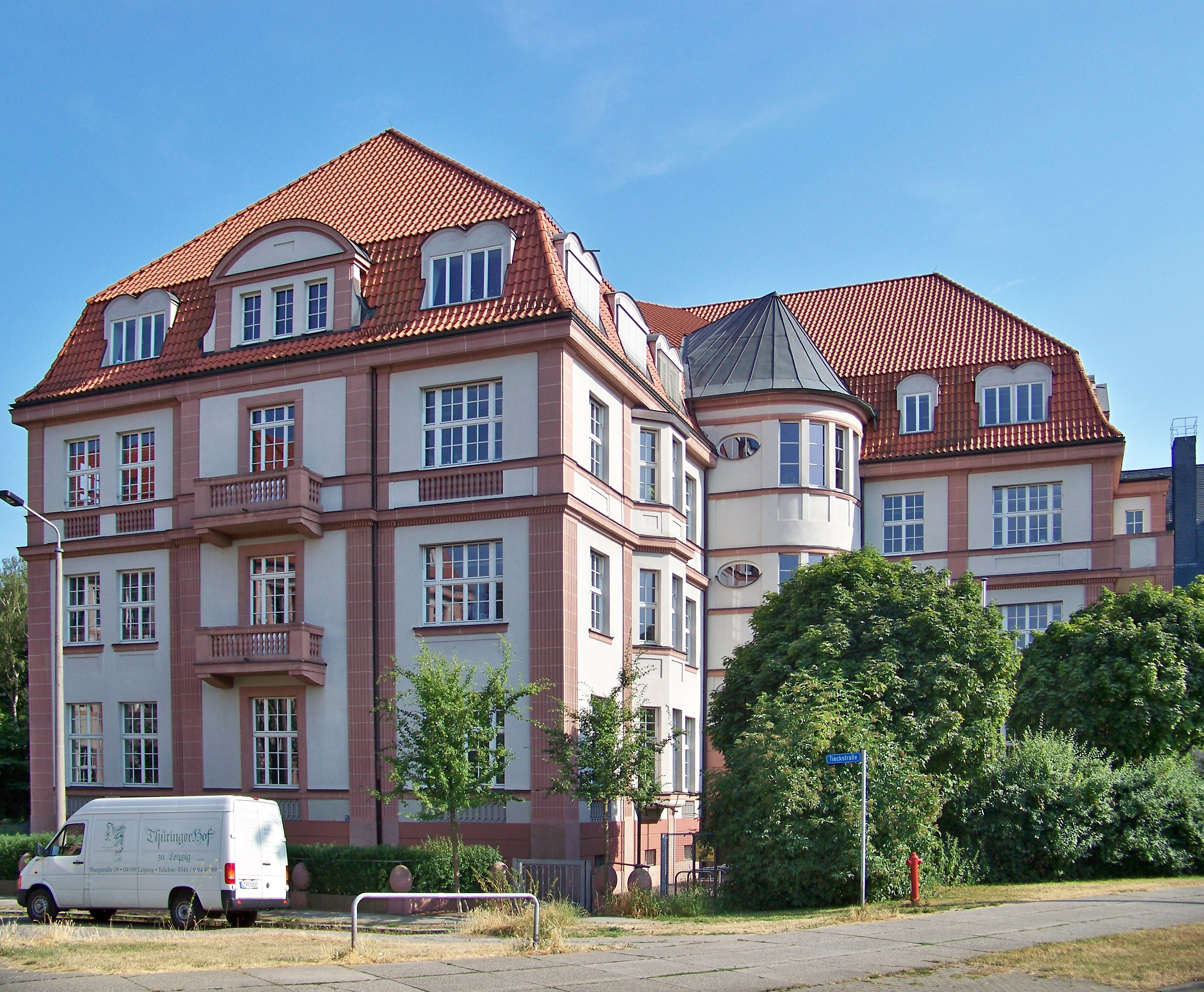 Gebäude Tieckstraße Nr.2 an der Ecke Wundtstraße im Stadtteil Südvorstadt